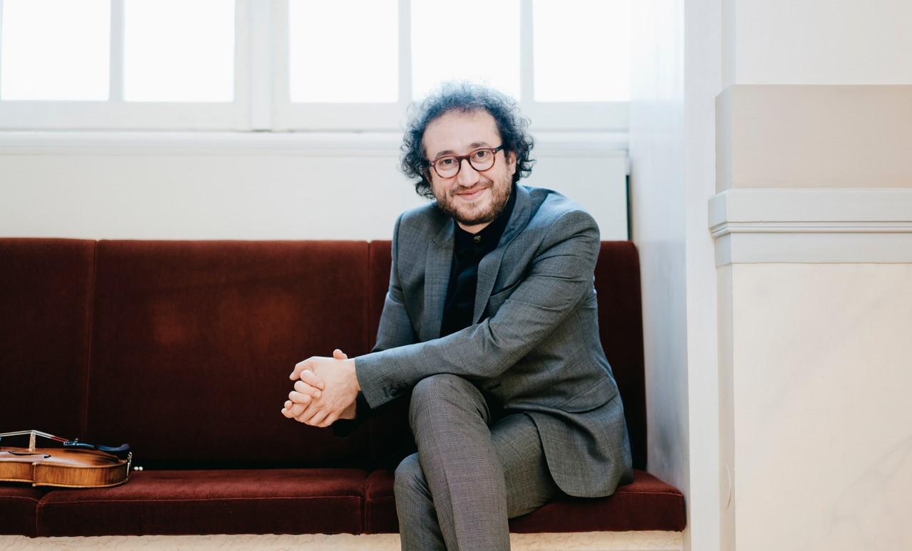 Der Musiker Atilla Aldemir mit seinem Instrument.